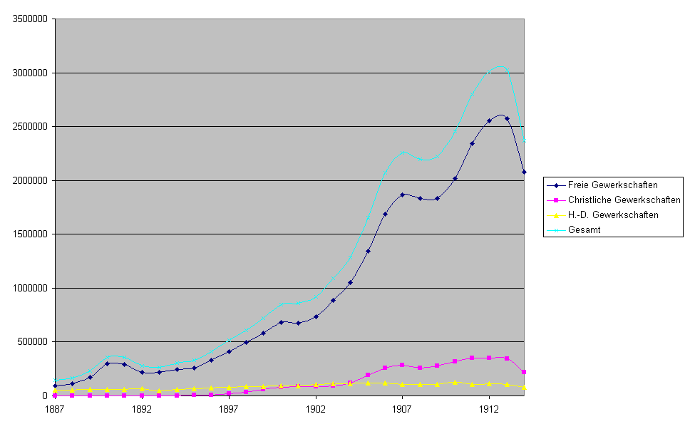 Entwicklung der Gewerkschaften in Deutschland 1887-1914 (Zahlen nach: Sozialgeschichtliches Arbeitsbuch 2, S.135f.)